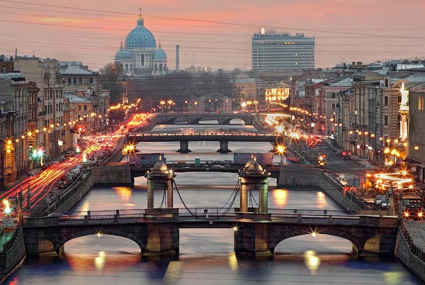 Использование произведения разрешается только при условии указания ссылки на блог автора